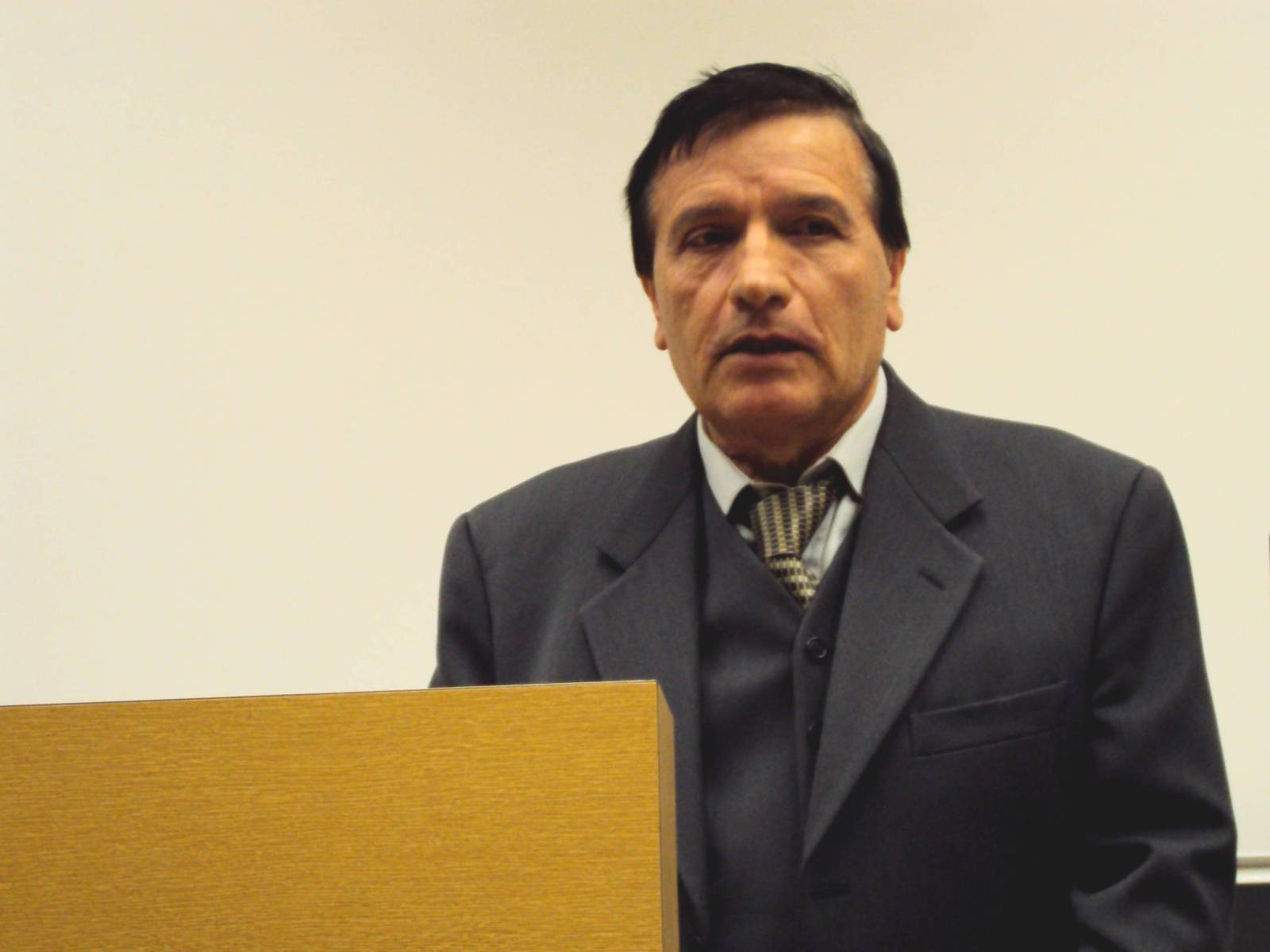 Antonio Delogu - Convegno UNI Zurigo 18-11-2011